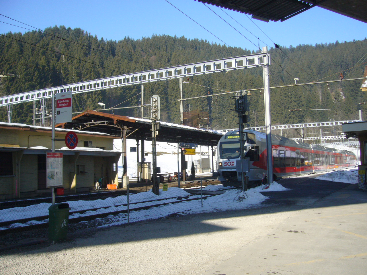 Bahnhof Biberbrugg, Kanton Schwyz, Schweiz